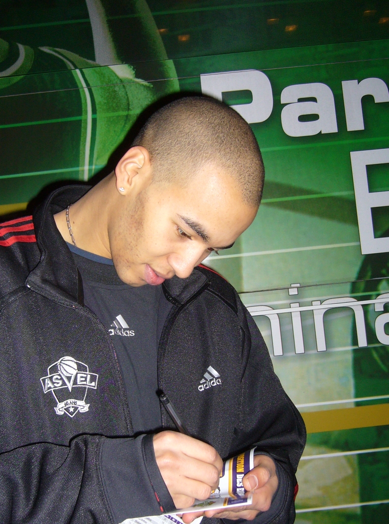 Le joueur français de basket-ball Yohann Sangare (ASVEL, à Clermont-Ferrand)